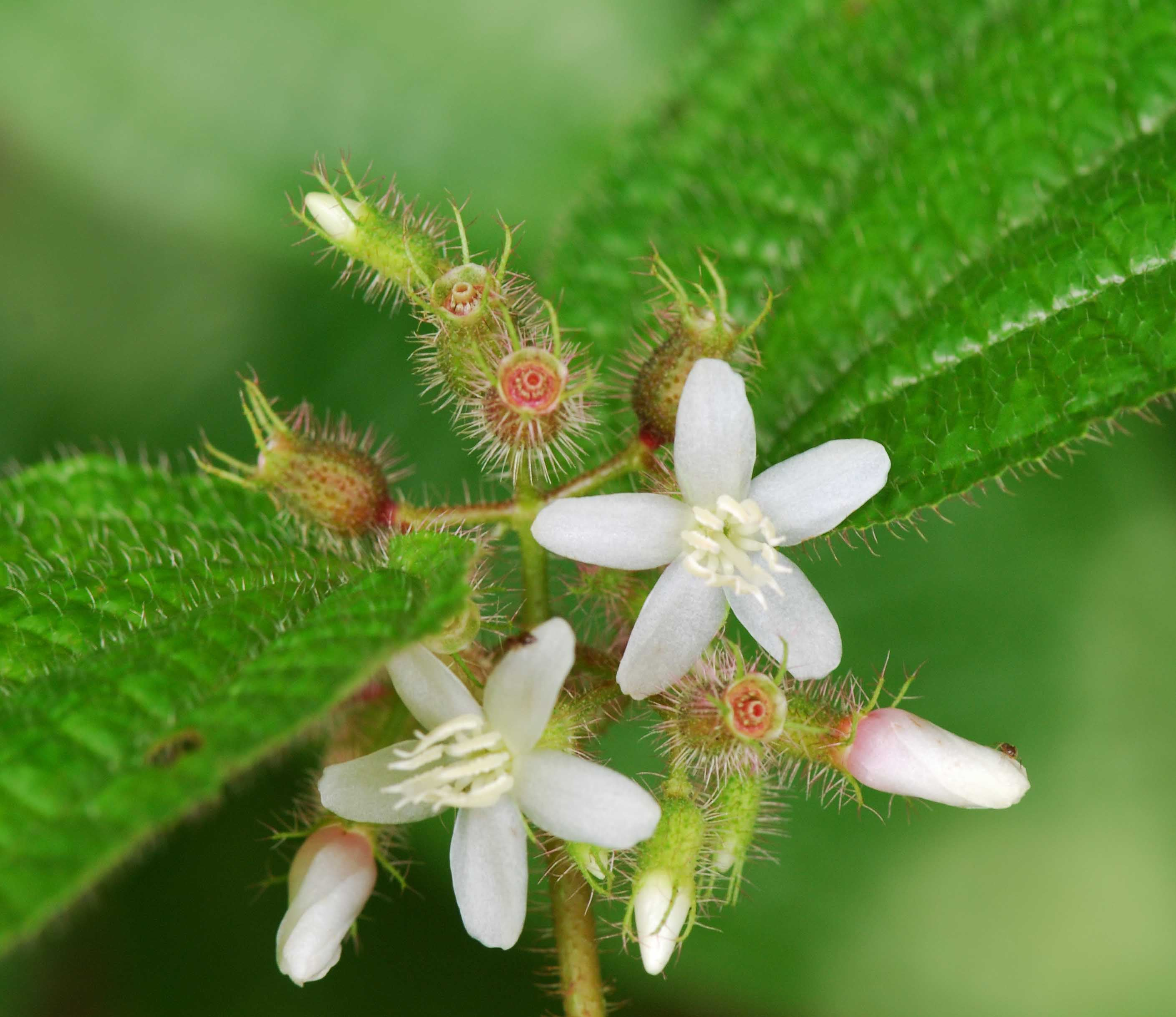 Clidemia hirta, Saint Hubert, île Maurice